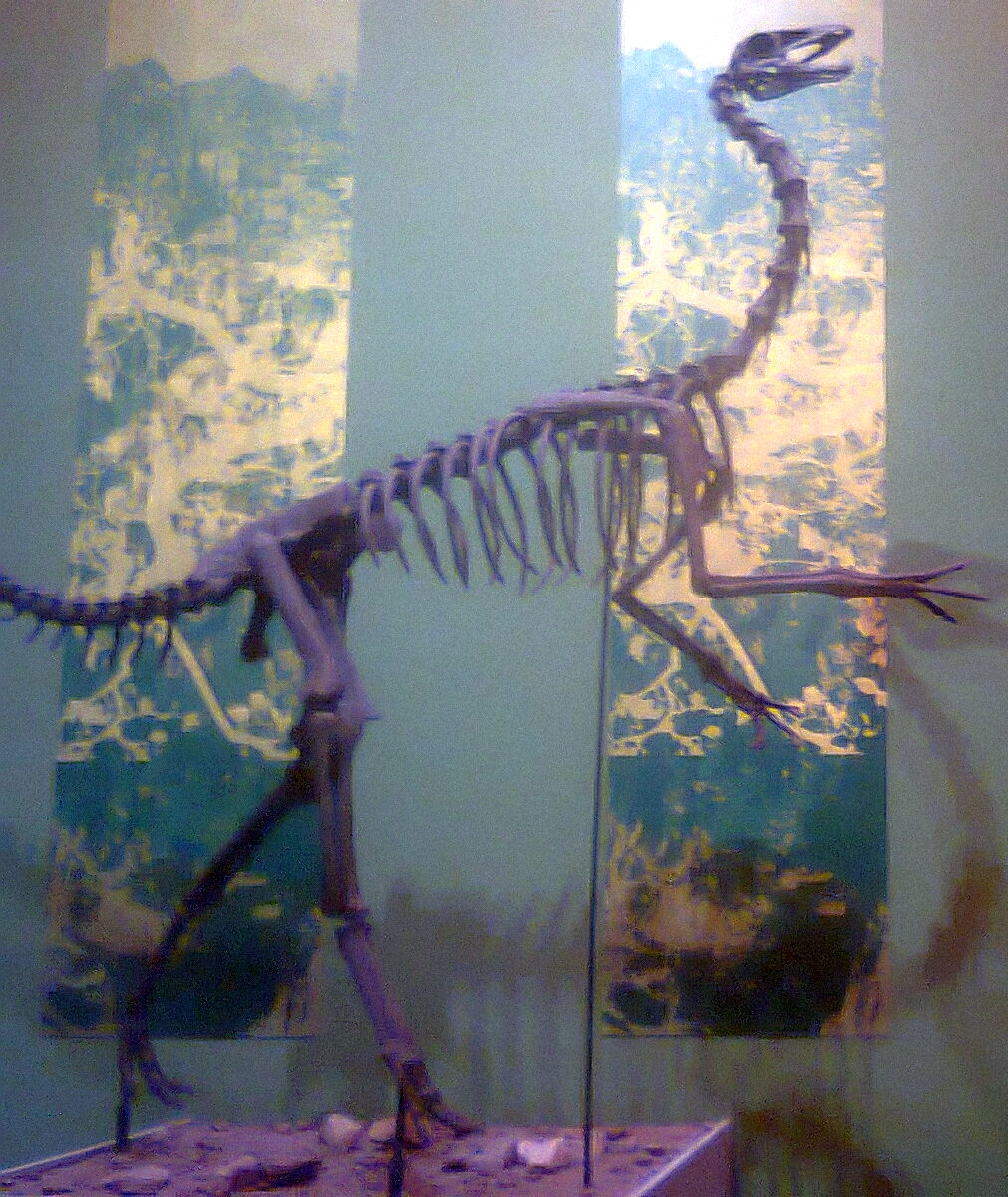 Reconstrucción del esqueleto de un ornithomimid (Saltillomimus) en el Museo del desierto de Delicias México